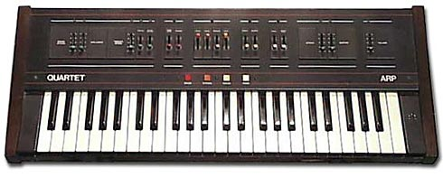 sintetizzatore ARP Quartet Licensing Categoria:Sintetizzatori Categoria:Sintetizzatori ARP